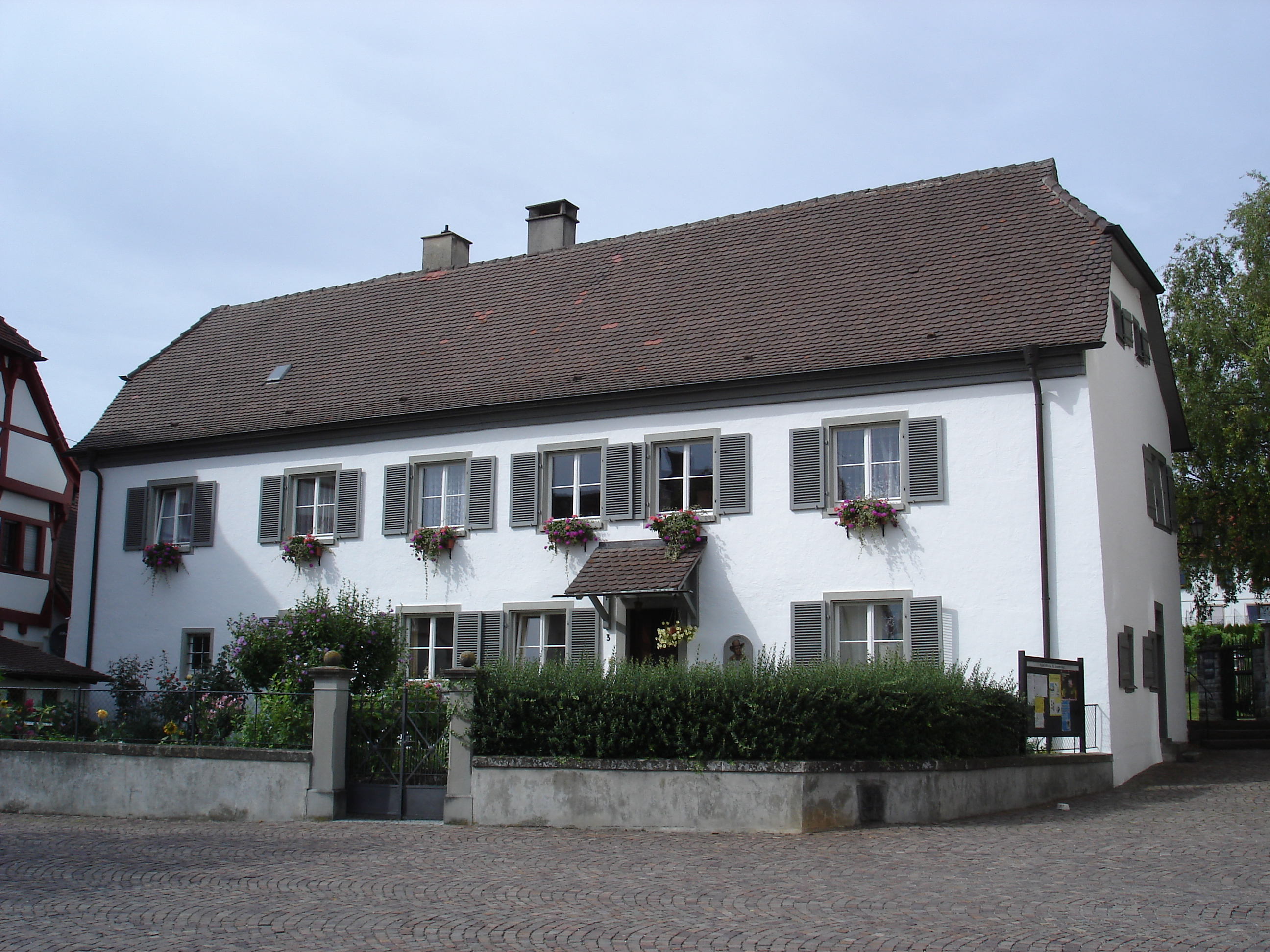 Wohnhaus (Pfarrhaus) von Heinrich Hansjakob in Hagnau am Bodensee